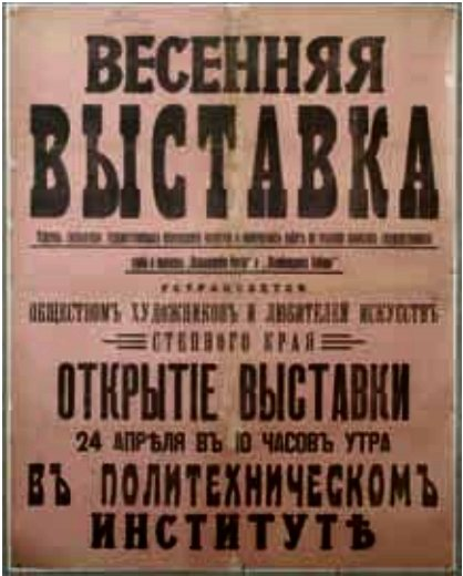 Объявление об открытиии весенней выставки Общества художников и любителей изящных искусств Степного края в Омске 24 апреля 1919.